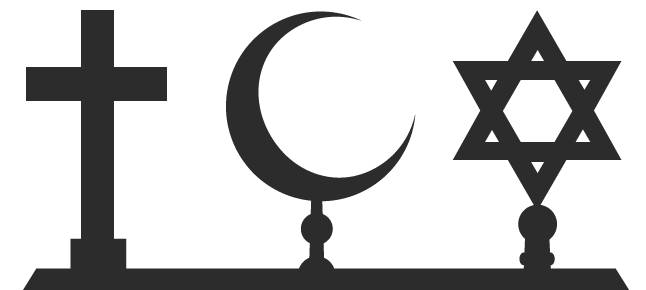 Los simbolos de las religiones, católica,musulmana y judia respectivamente